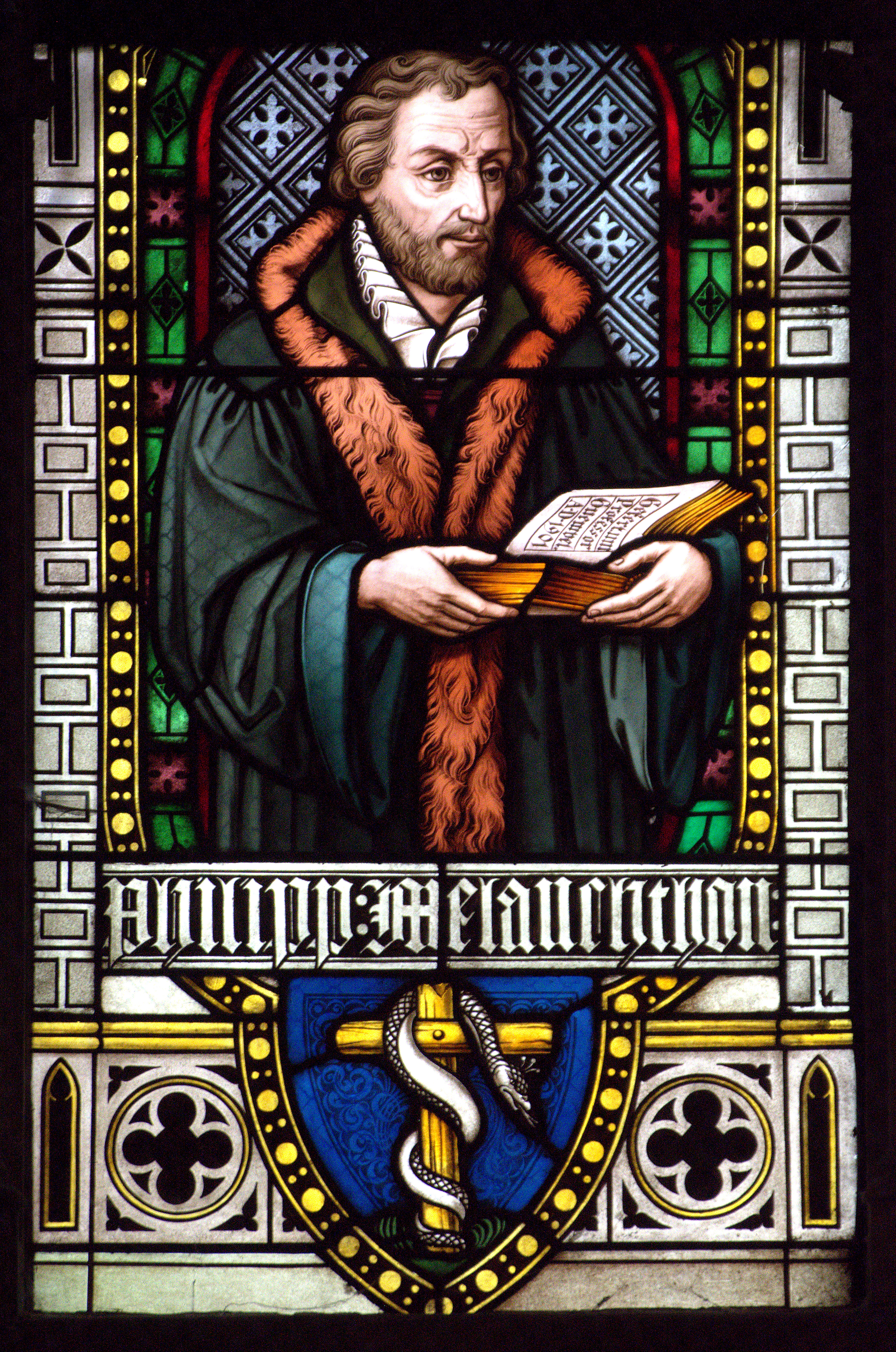 It finster fan de tsjerkeherfoarmer Philipp Melanchthon yn de Gedächtniskirche fan Spiers